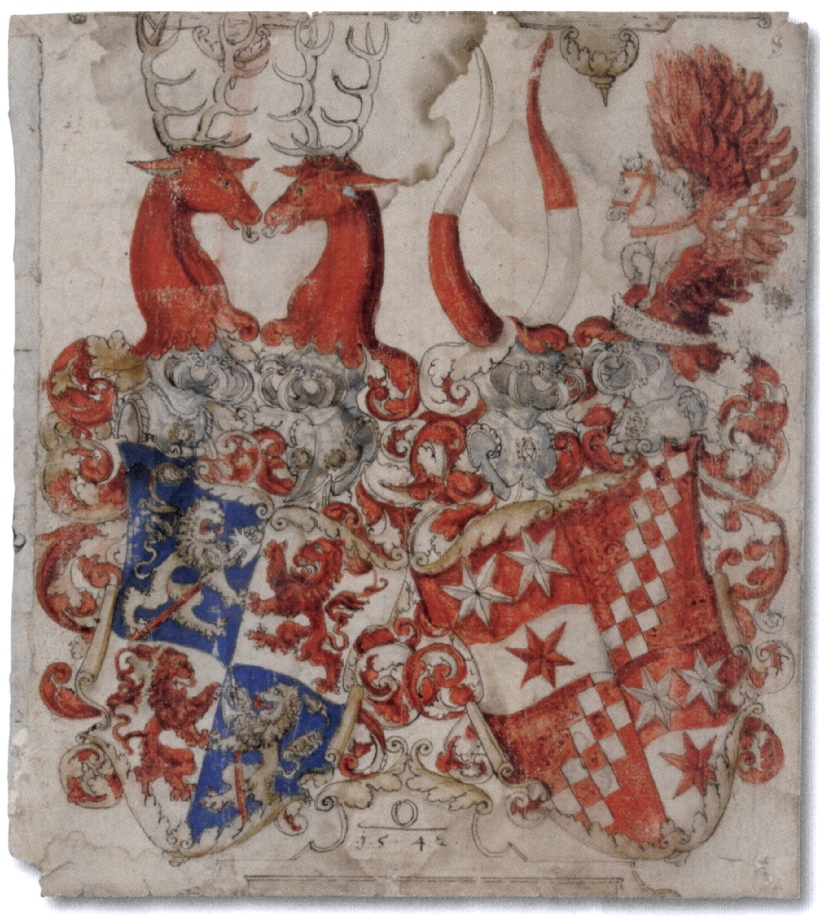 Wappenblatt mit Allianzwappen Zimmern / Erbach (Johann Werner von Zimmern der Jüngere und Katharina von Erbach), datiert 1542, womöglich aus einer Chronik der Fam. Erbach von Wilhelm Werner von Zimmern (siehe Fragment auf der Rückseite); anonymer Wappenmaler, frühere Zuschreibung an den Meister von Meßkirch ist ohne Grundlage; Fürstlich Fürstenbergisches Archiv Donaueschingen